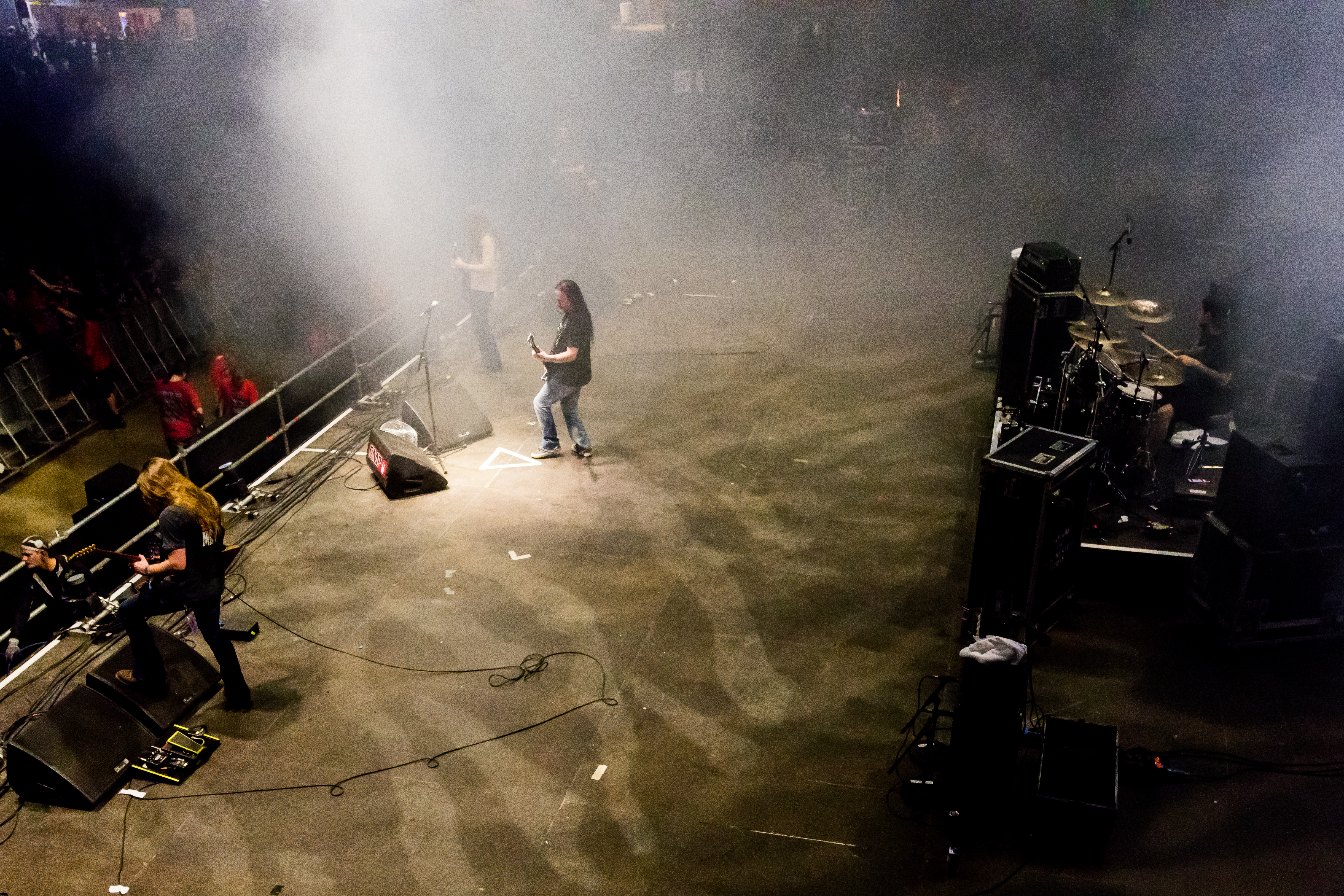 Carcass during Summer Breeze 2016 at , Dinkelsbühl, Bayern, Germany on 2016-08-19, Photo: Sven Mandel